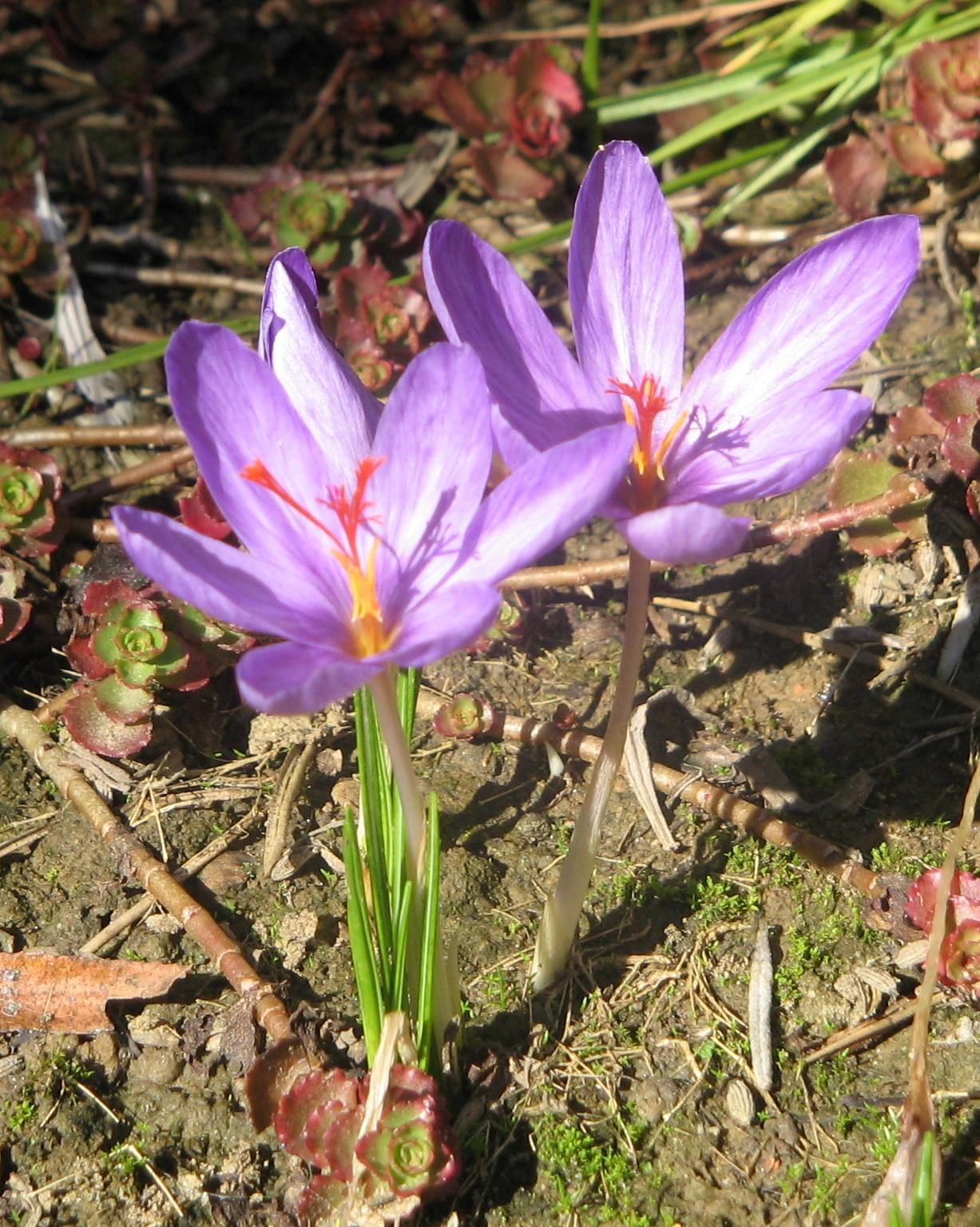 Crocus ligusticus dans mon jardin